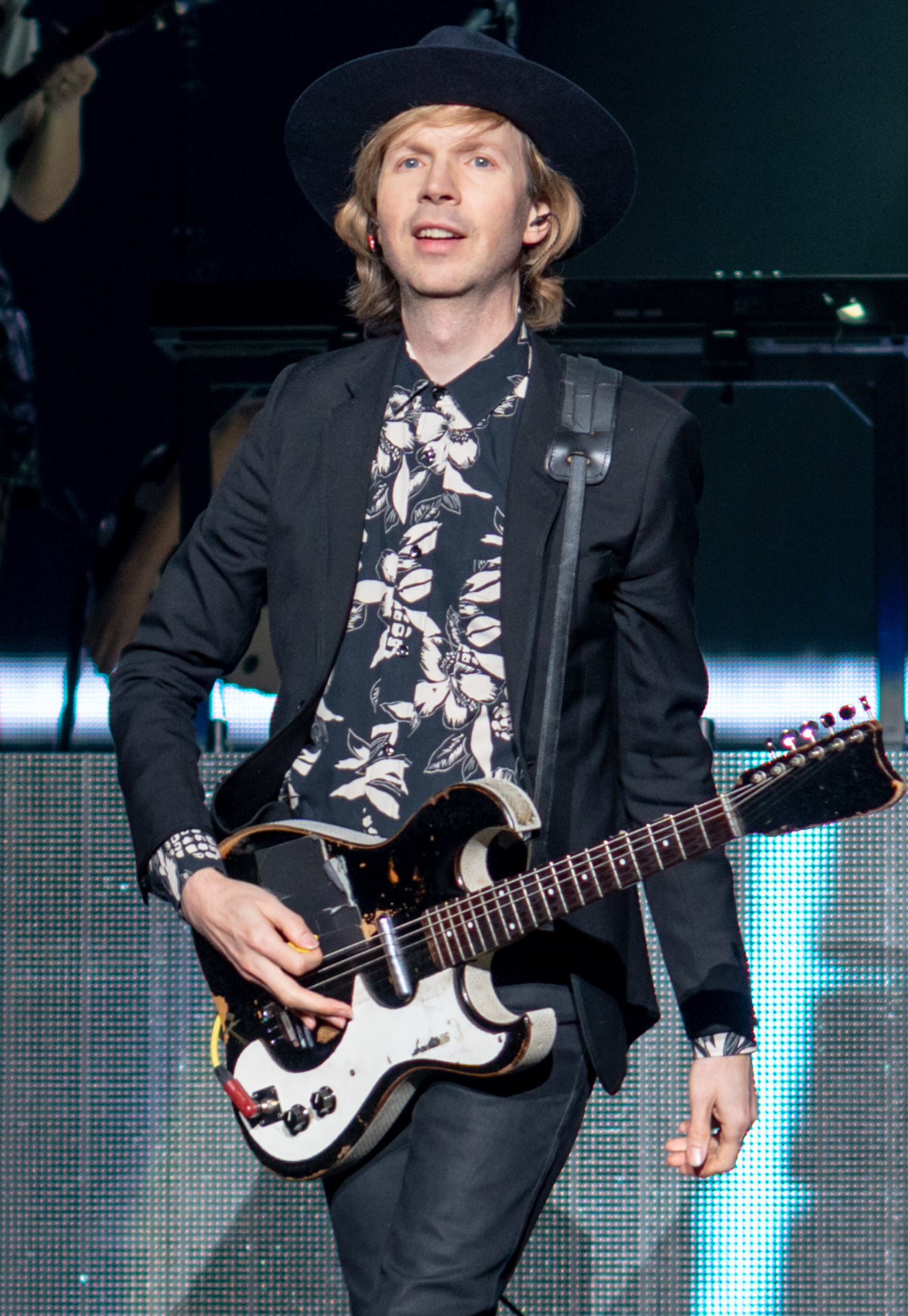 BeckMSG190718-13